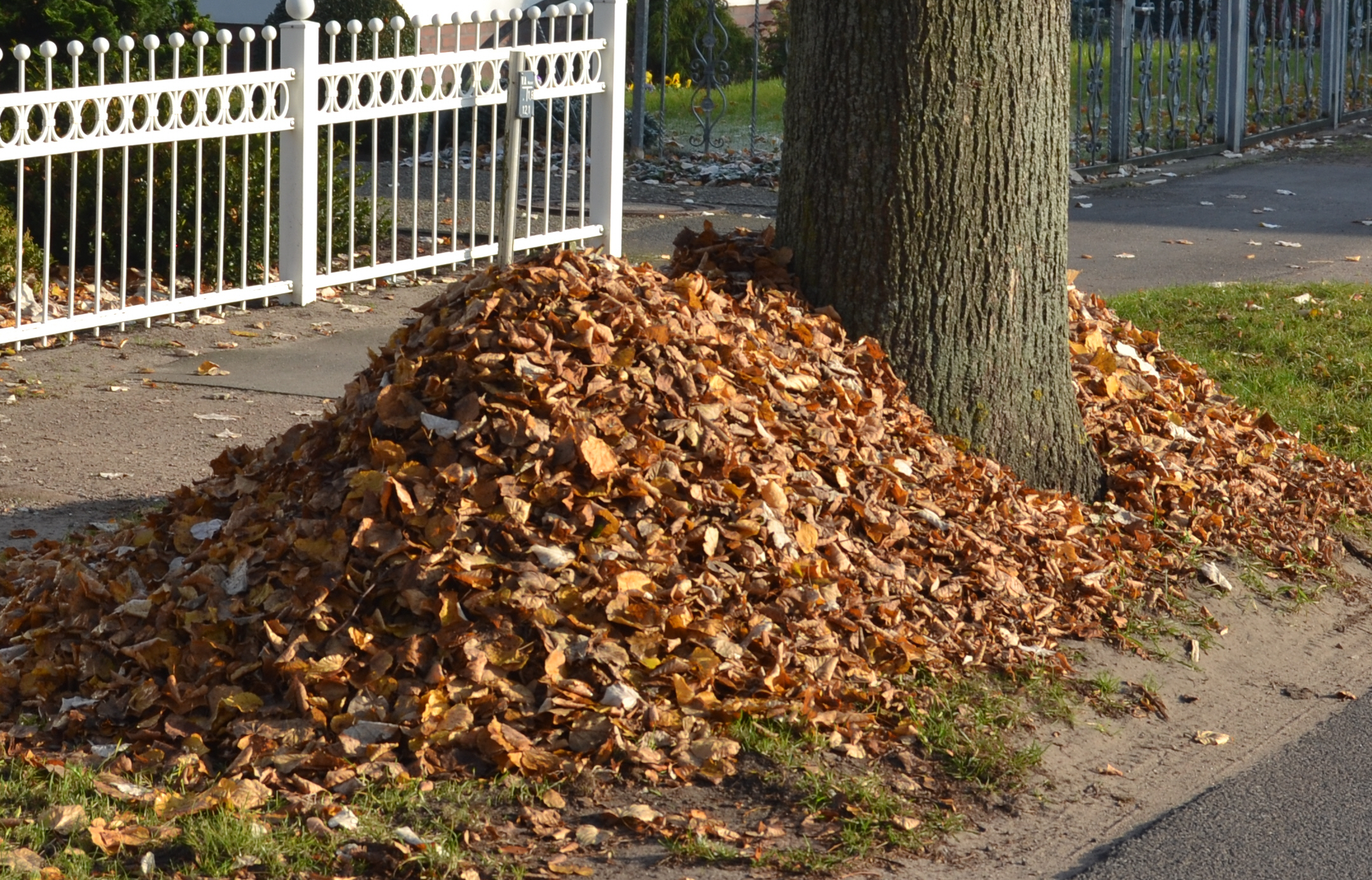 Shrabané listí jako prevence před dalším šířením klíněnky jírovcové (Cameraria ohridella)